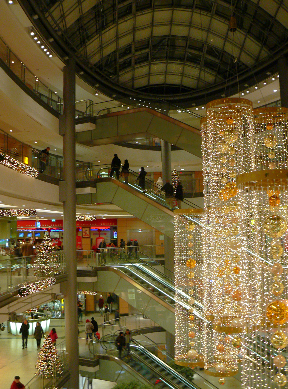 Citygalerie